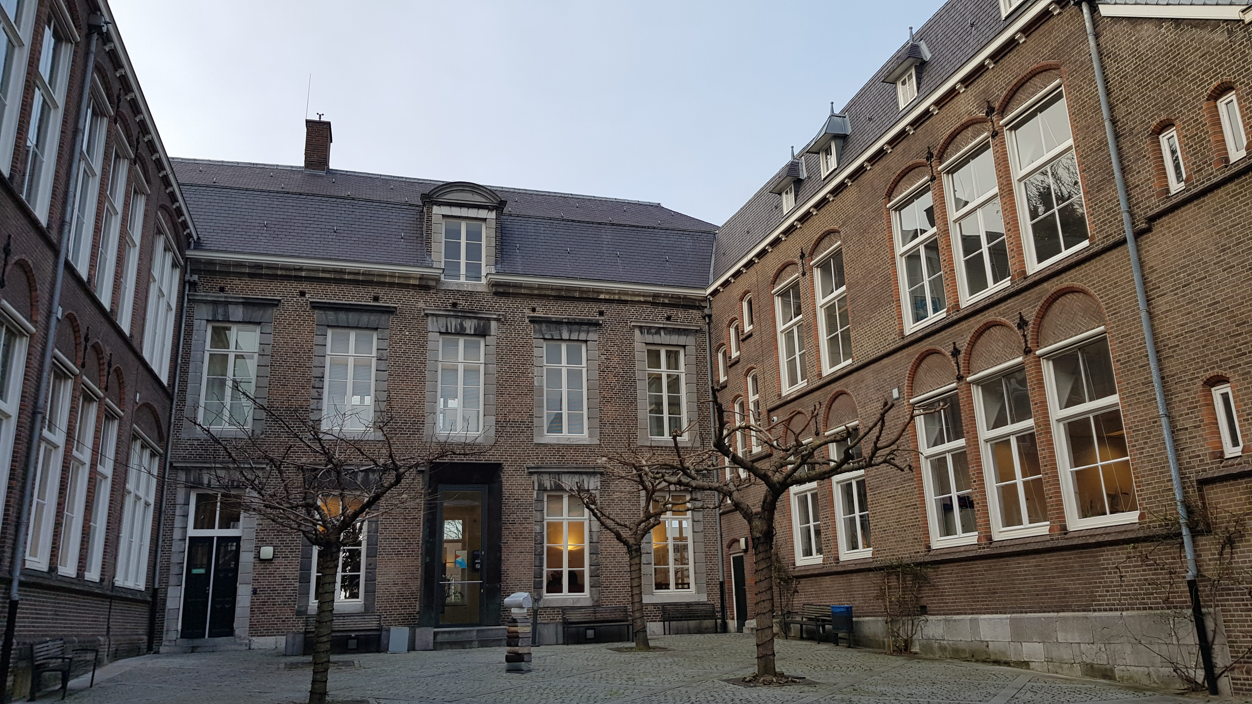 Hof van Tilly, Maastricht, Nederland